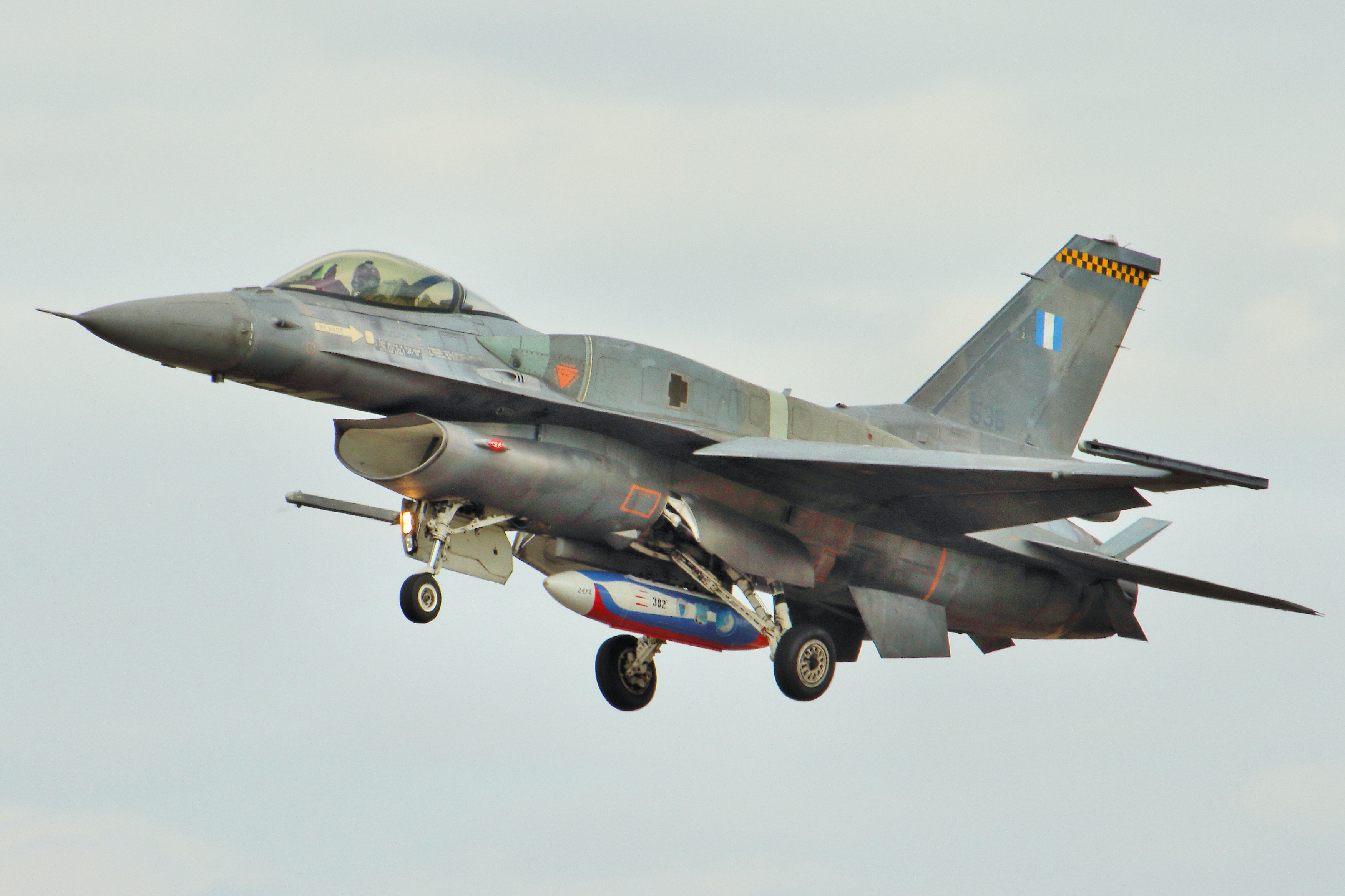 F16 - RIAT 2015